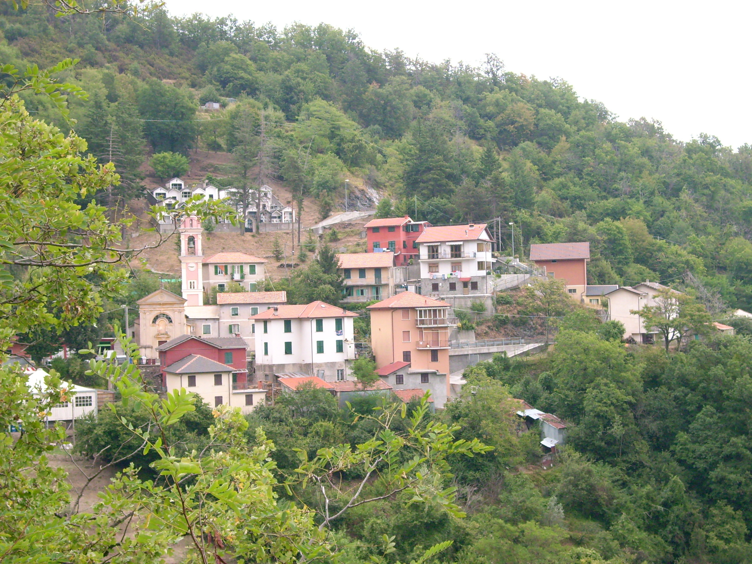 Panorama di Boasi, Lumarzo, Liguria, Italia